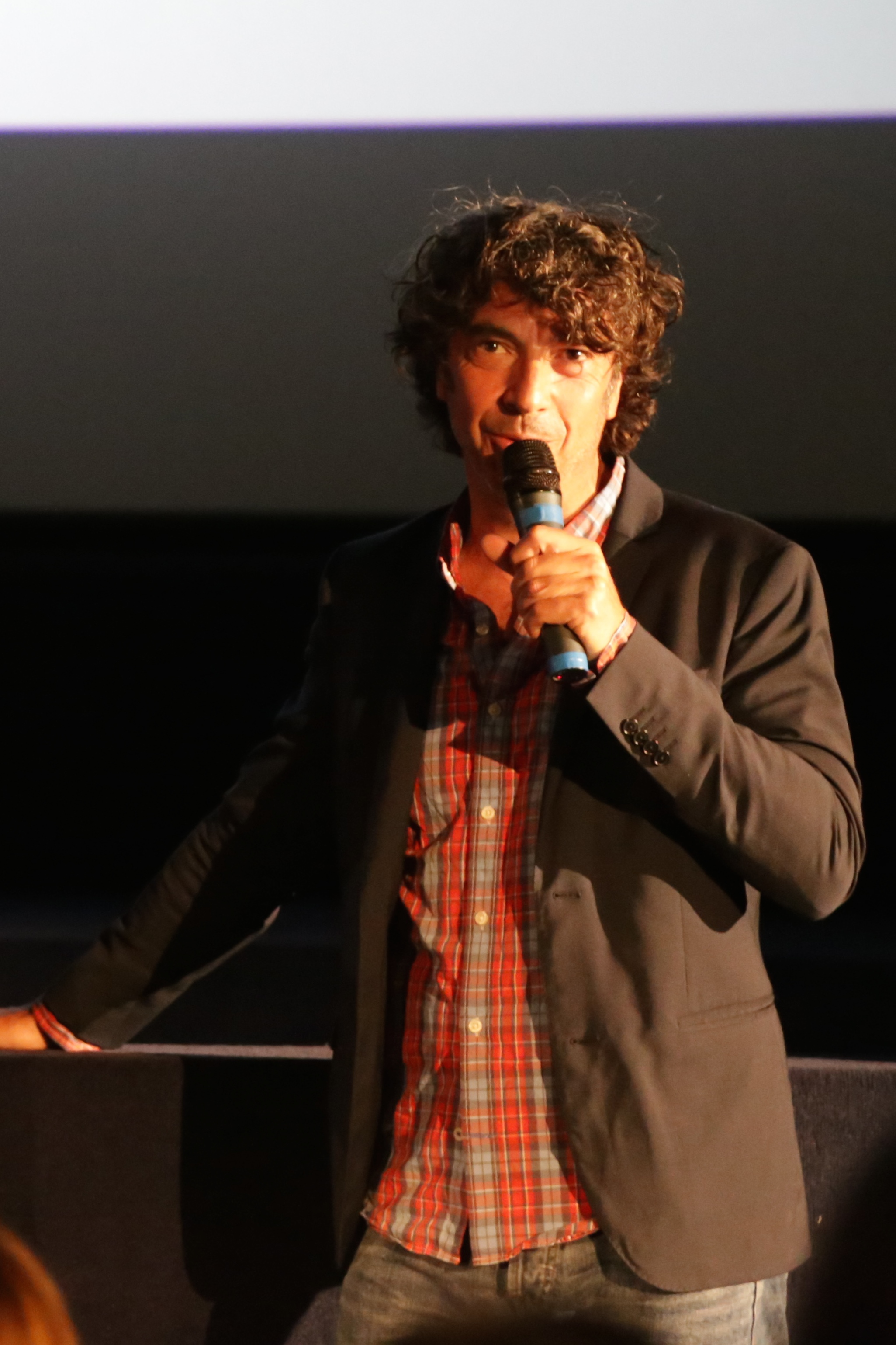 Avant 1er du film Barbecue